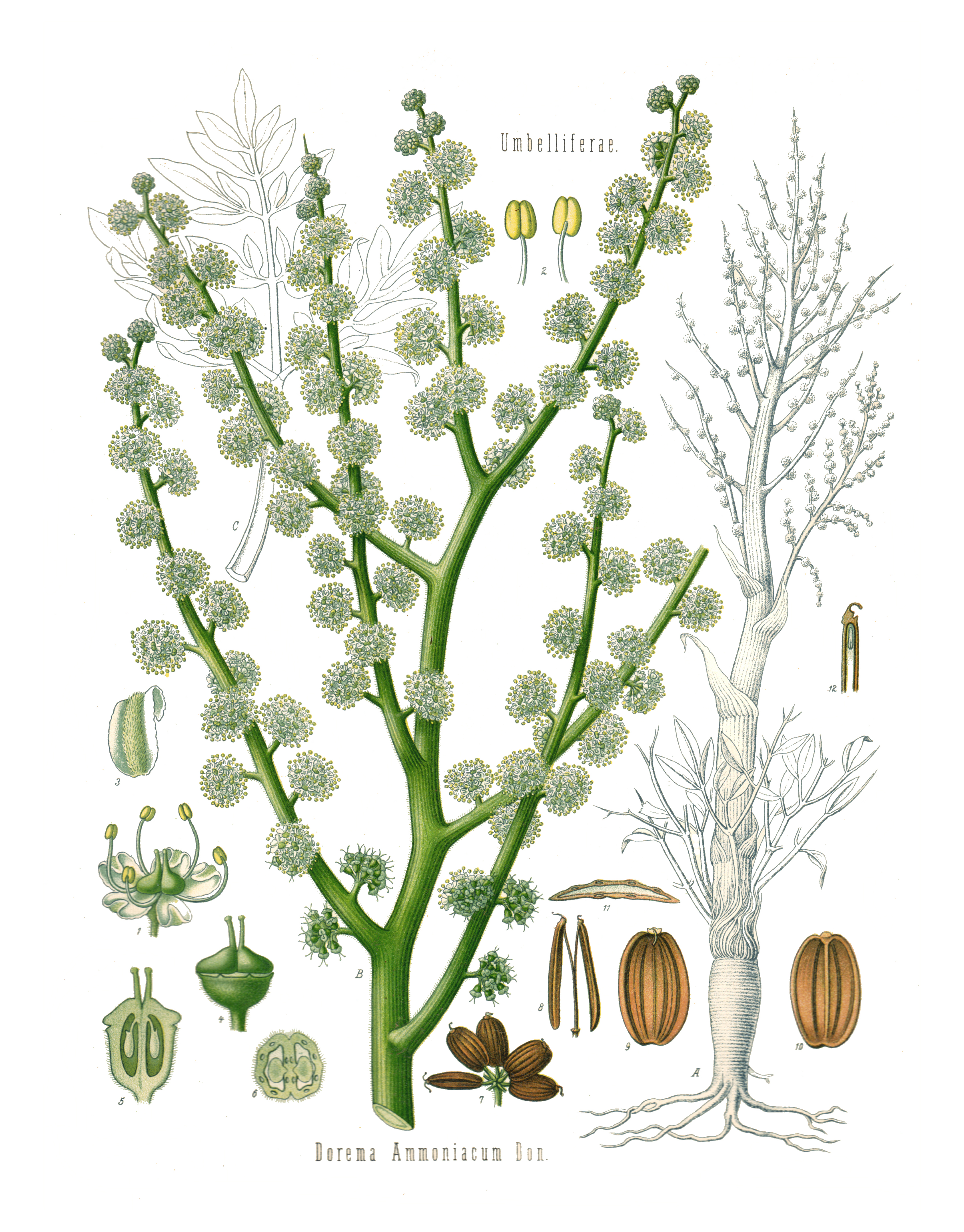 Abbildung von Dorema ammoniacum